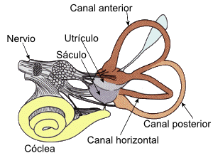 Vestibular System Sistema vestibular